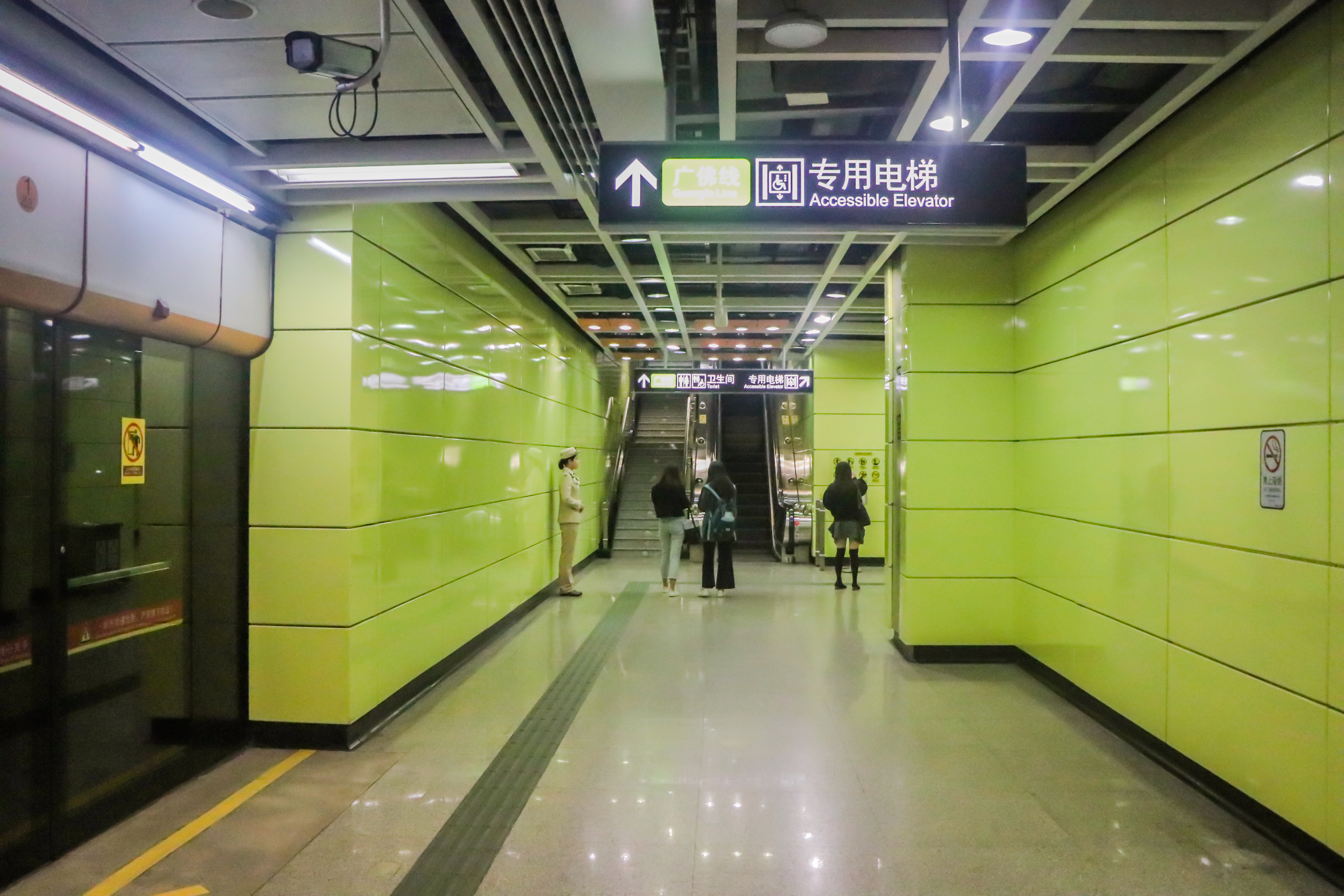 广州地铁沥滘站